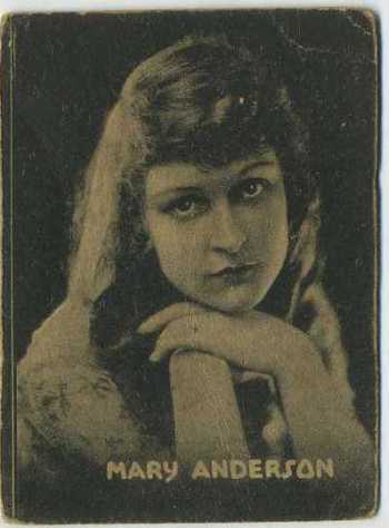 Mary Anderson - Susini y Bock Ovalados Tobacco Card